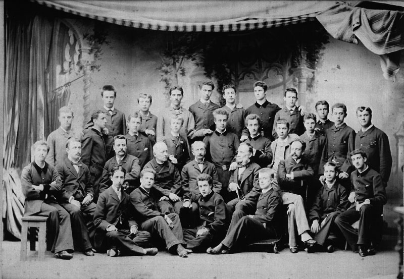 Terza Liceo Sezione A - Liceo Marco Foscarini di Venezia. Fonte: sito del Liceo Marco Foscarini ( Licenza d'uso: Pubblico dominio, foto del 1882.